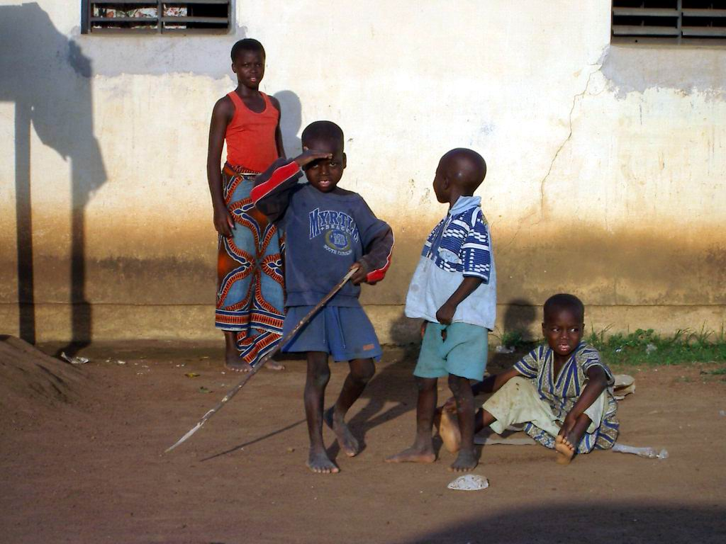 Una foto della missione africana di Lomè (Togo).